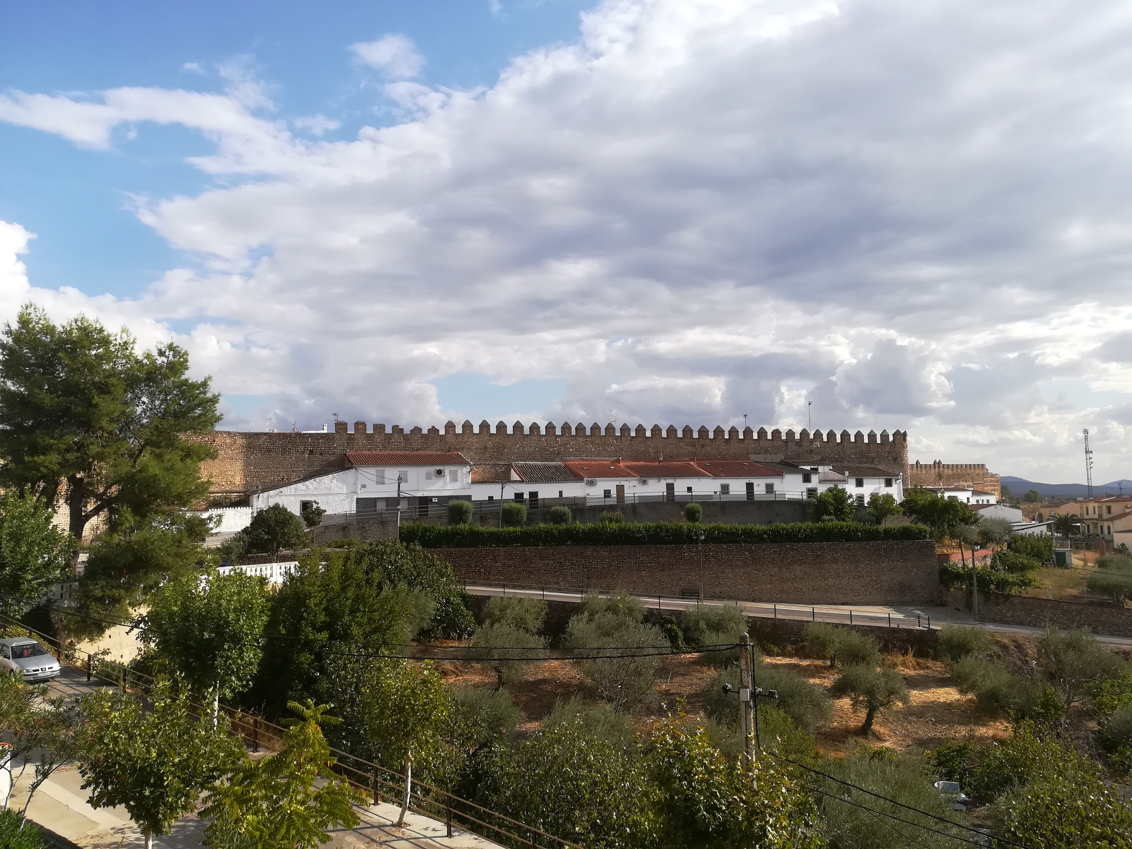 Muralla de Galisteo